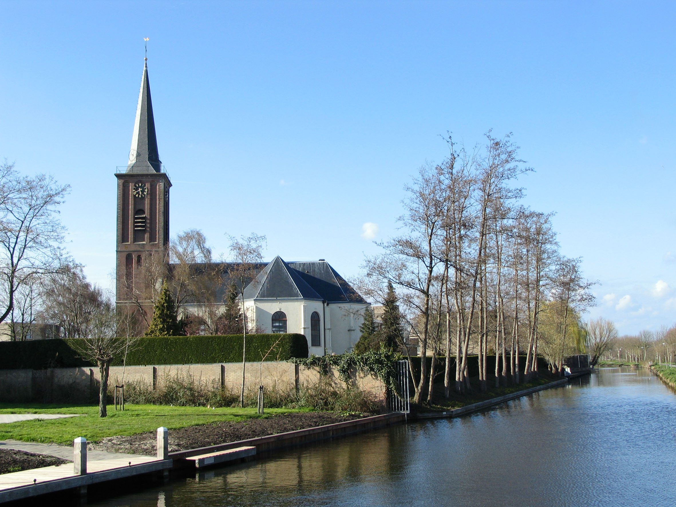 PKN kerk (voorheen NH) uit 1858.